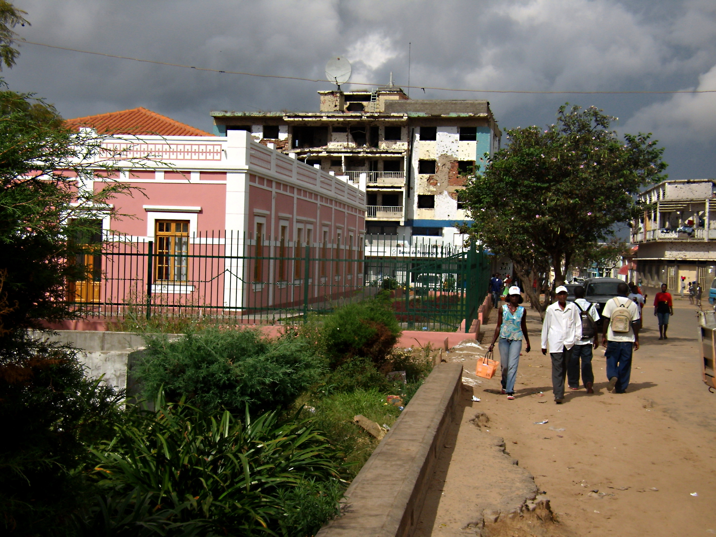 Antítese